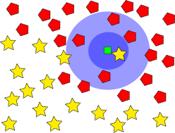 Klassifikation im R^2 durch das k-nearest-neighbor Verfahren (k=1, k=5)